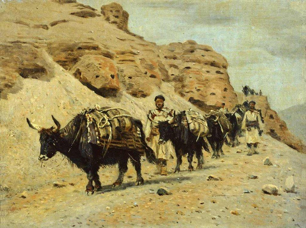 Яки, караван в Ладаке